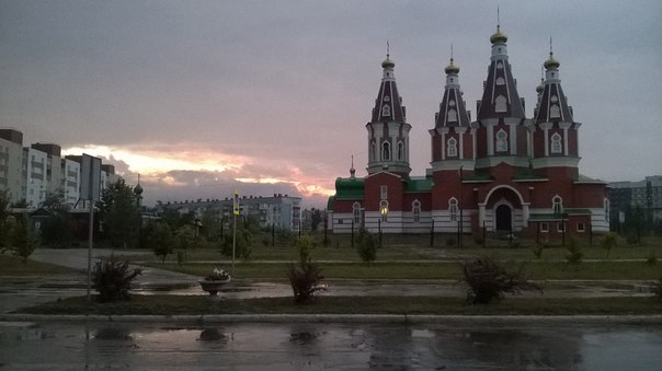 Храм в Отрадном